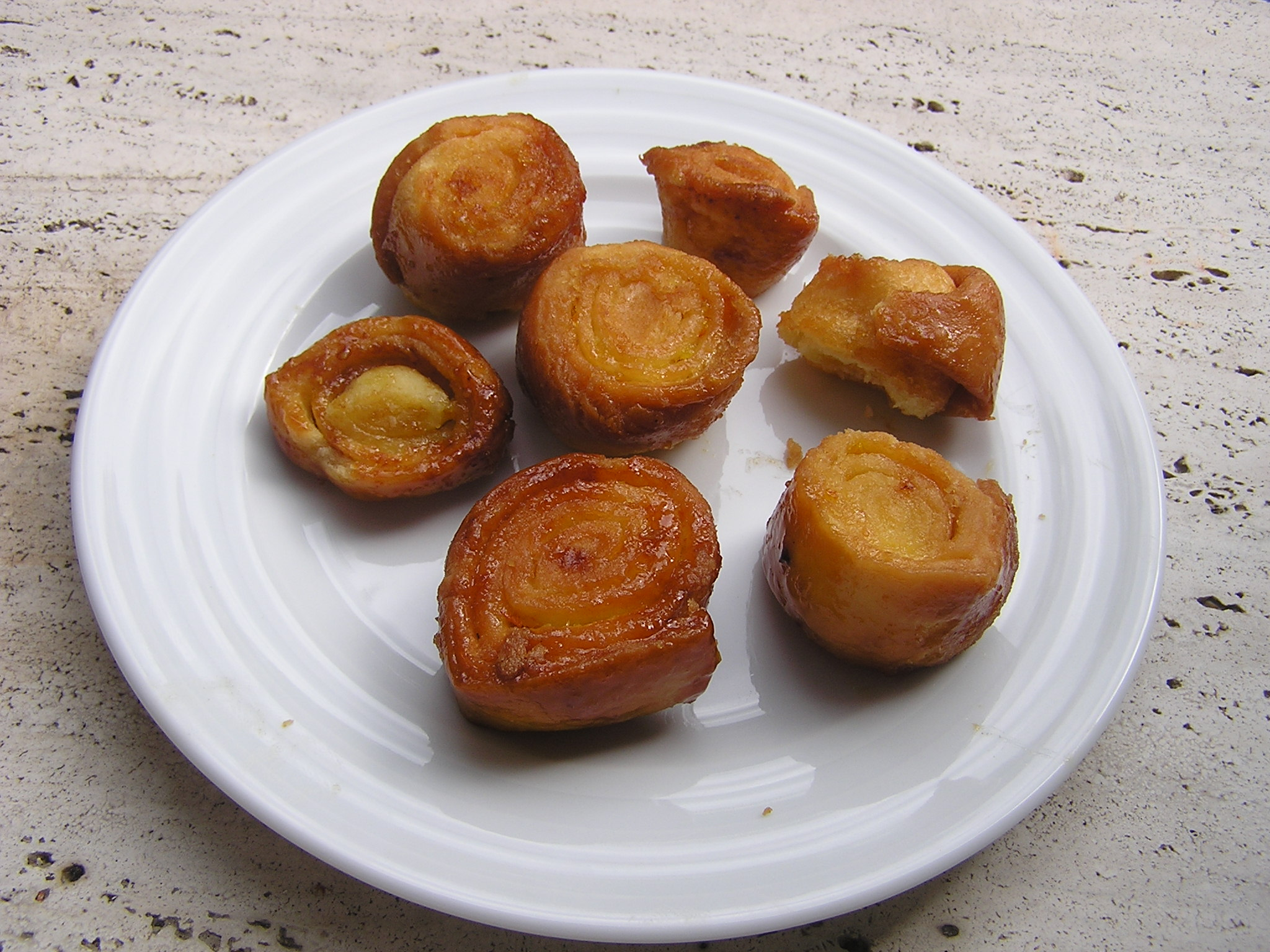 gli arancini sono un dolce carnevalesco tipico delle Marche, preparati stendendo una sfoglia dolce e arrotolandola dopo averla ricoperta di buccia d'arancio grattugiata (da cui il nome).